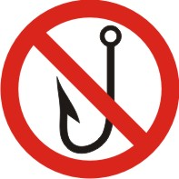 Pictograma No Te Enganches